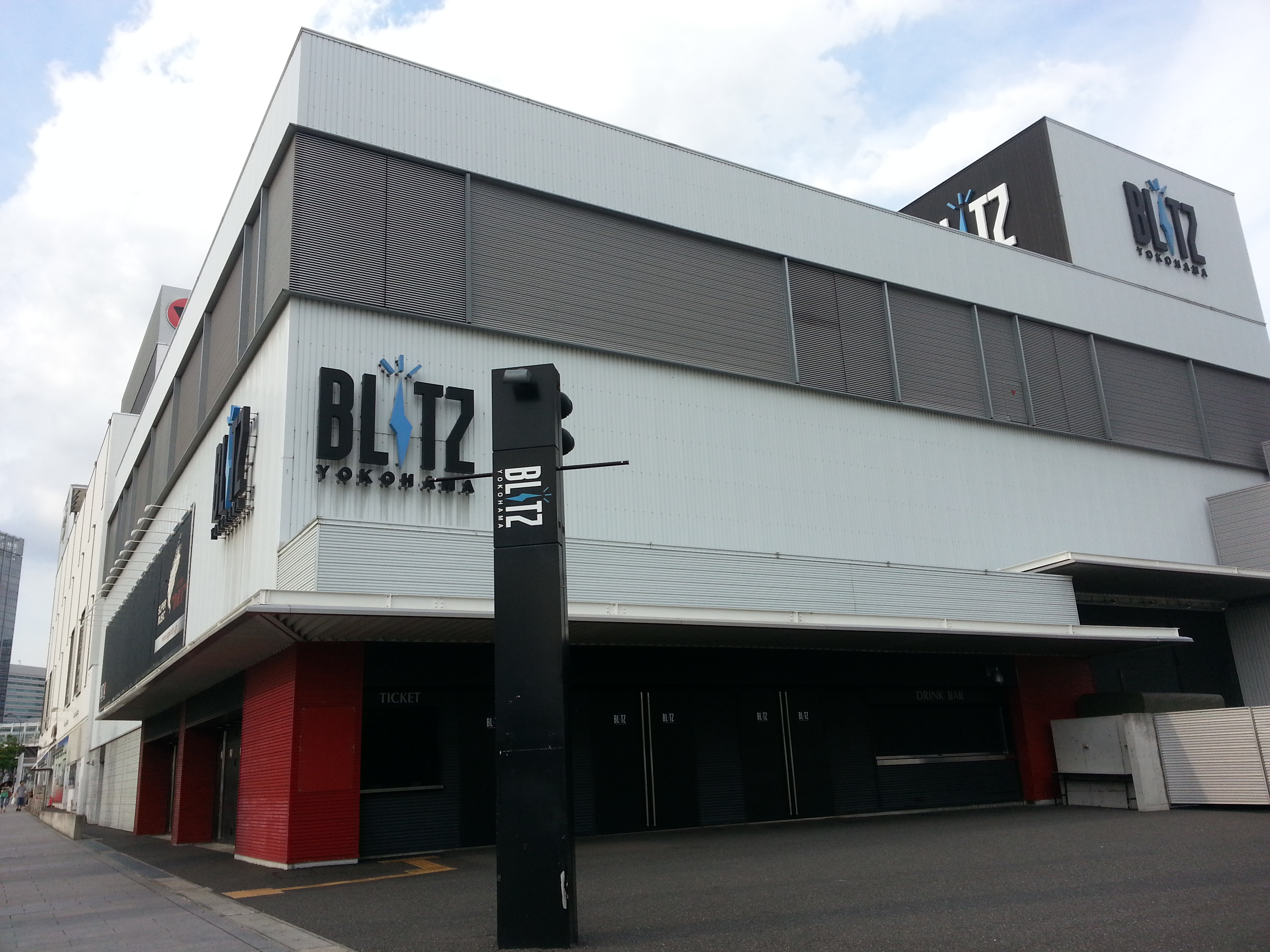 2013年10月の閉鎖が発表された横浜BLITZの外観。